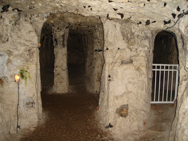 La chapelle (nef centrale) - Grottes de Naours